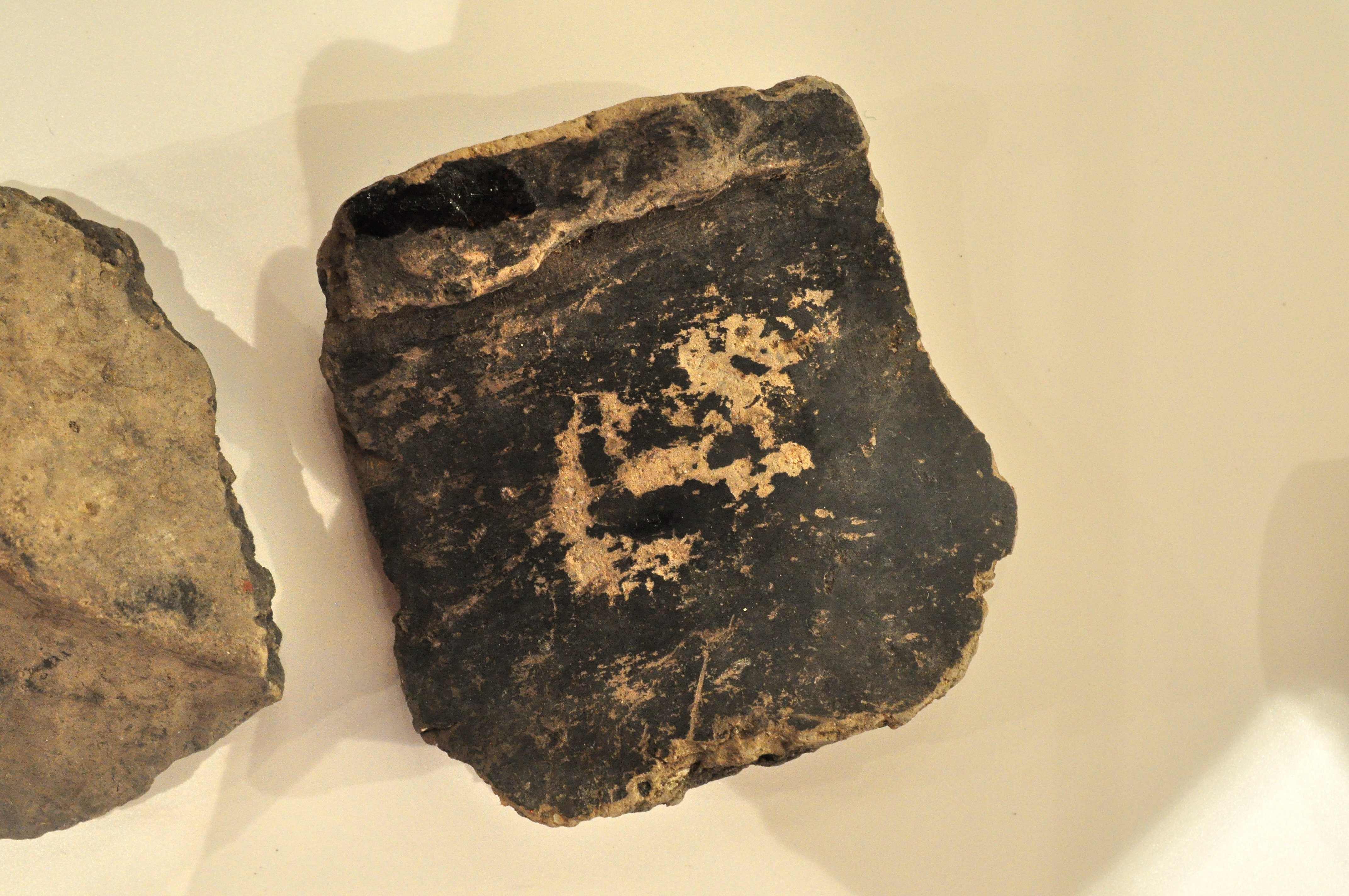 Katzensee in Regensdorf : Gefässscherben, der Pfyner Kultur verwandt, Katzenseeufer, GMR 2613.